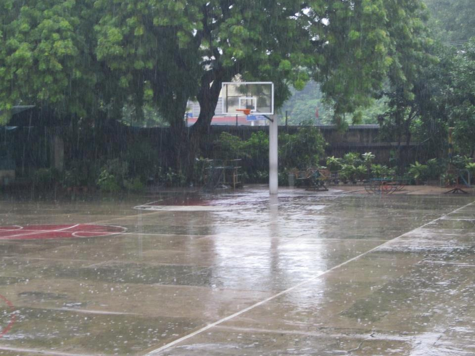 Basketball field